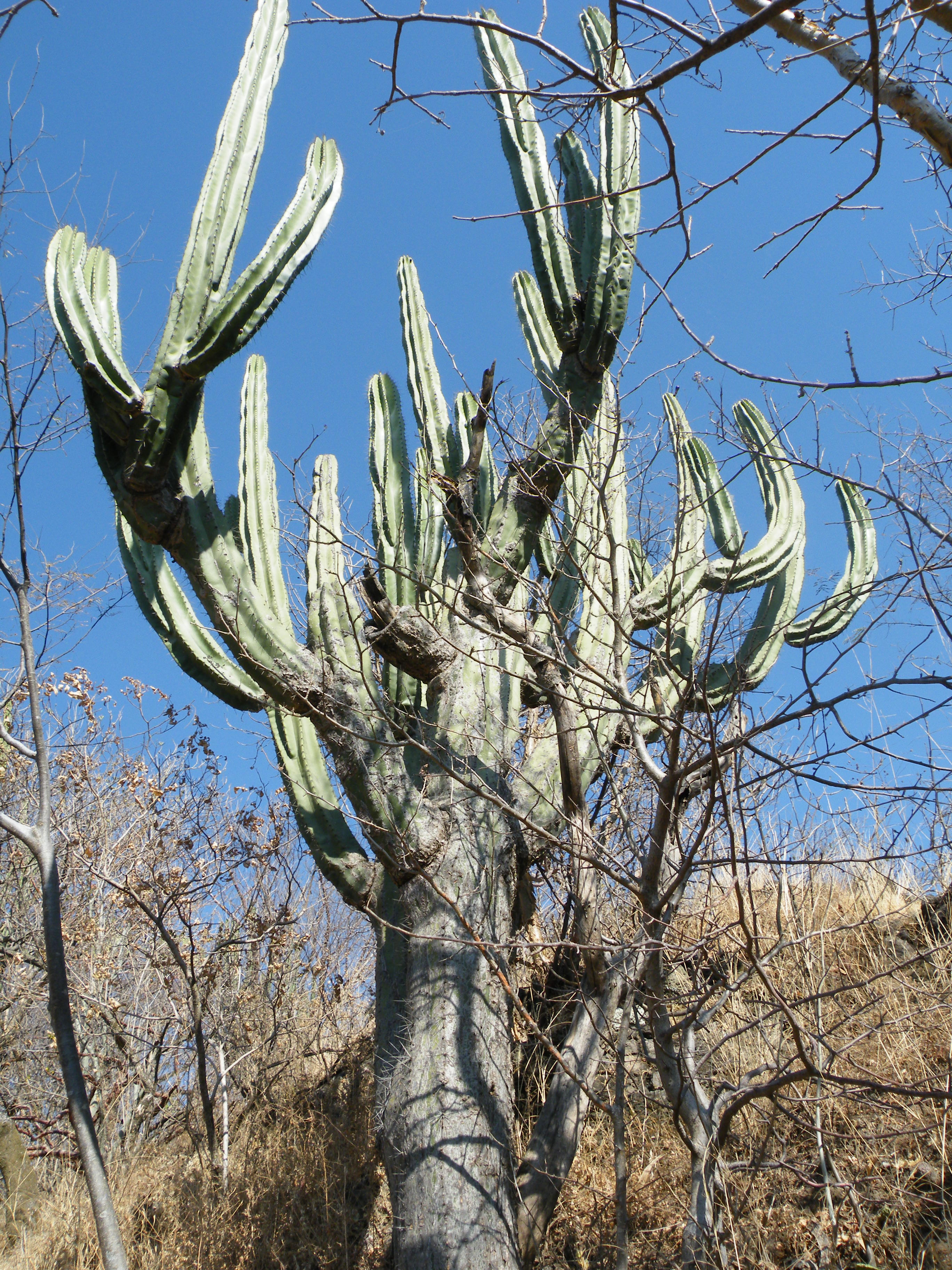 Baranca de los Oblatos, Guadajara